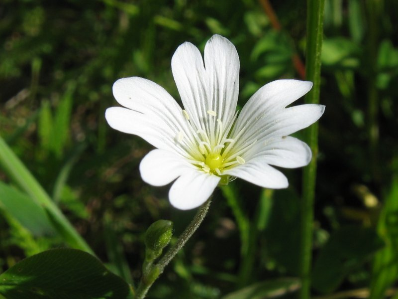 Acker-Hornkraut Cerastium arvense, Stoltera Nähe Rostock